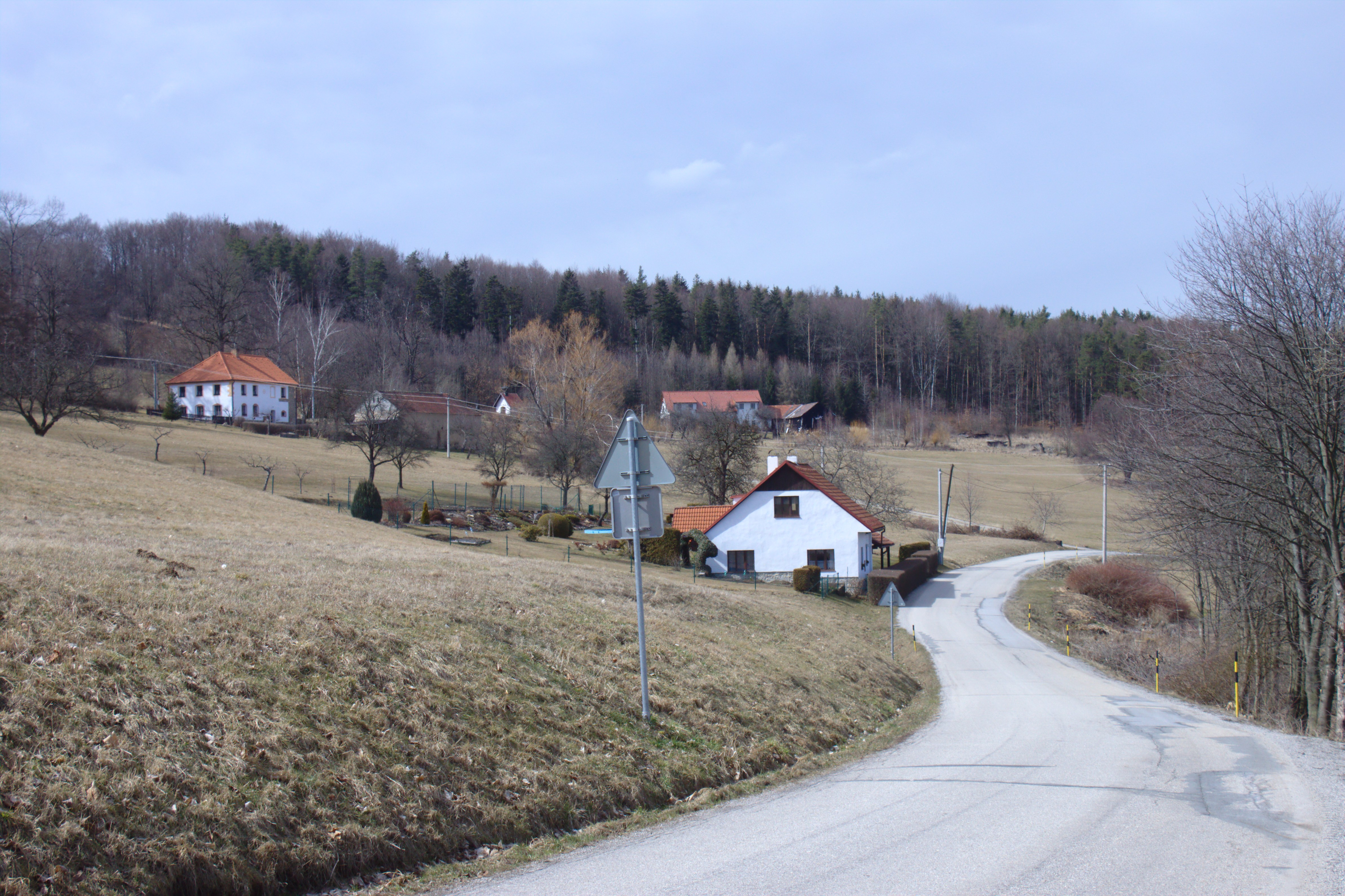 Chalupy ve vesnici Rychtářov Project: Fotíme Česko